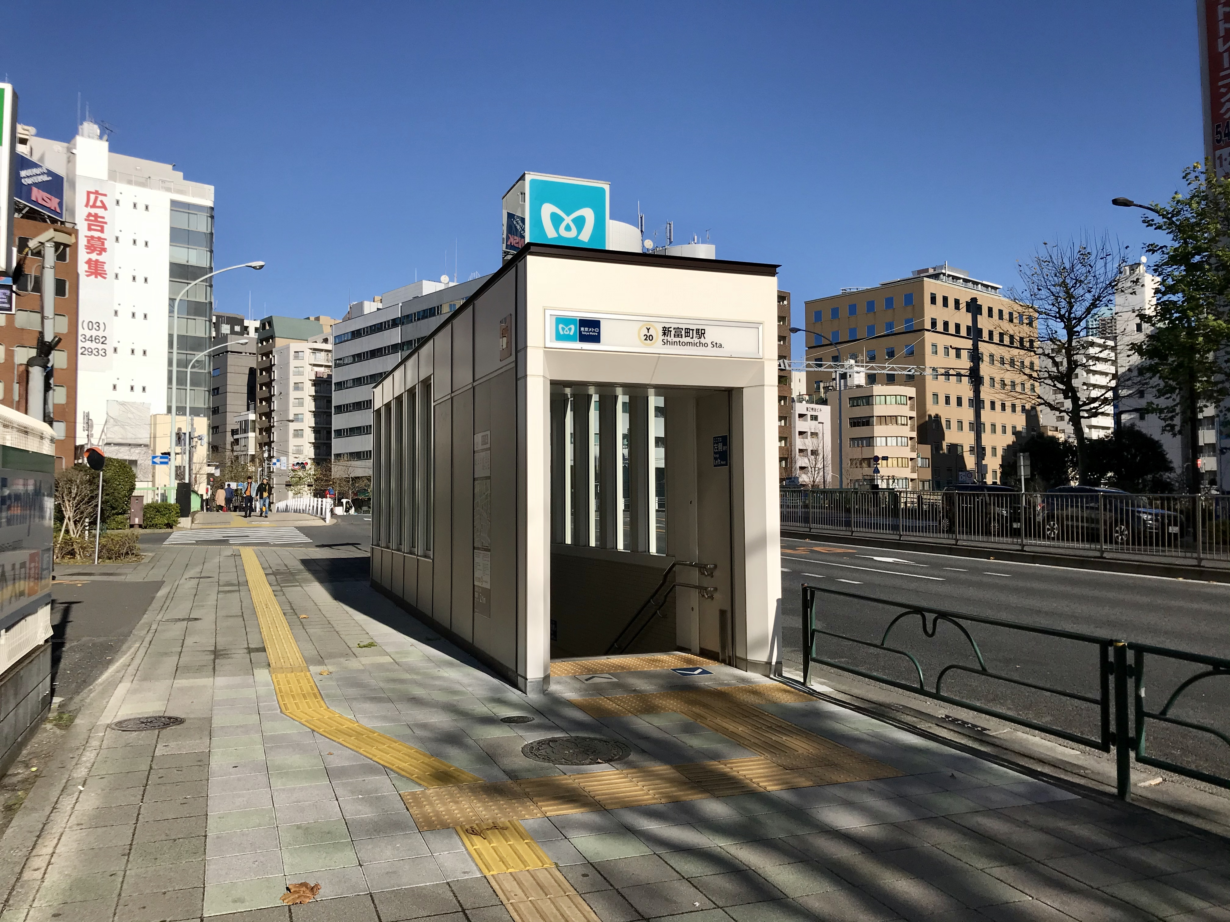 東京メトロ有楽町線新富町駅4番出入口（リニューアル後）